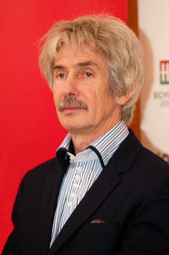 Baja Ferenc 2013-ban